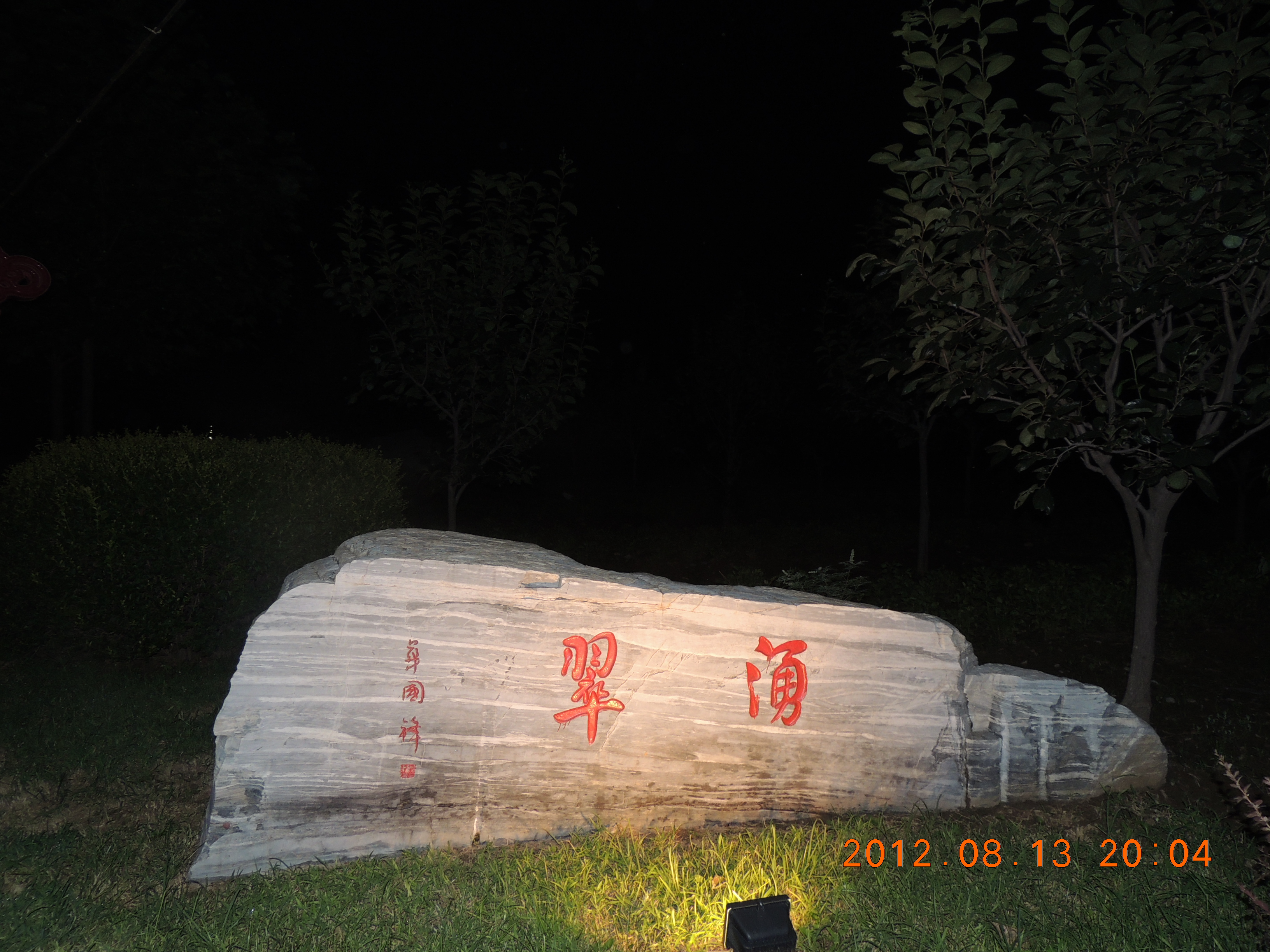 华国锋的墨宝